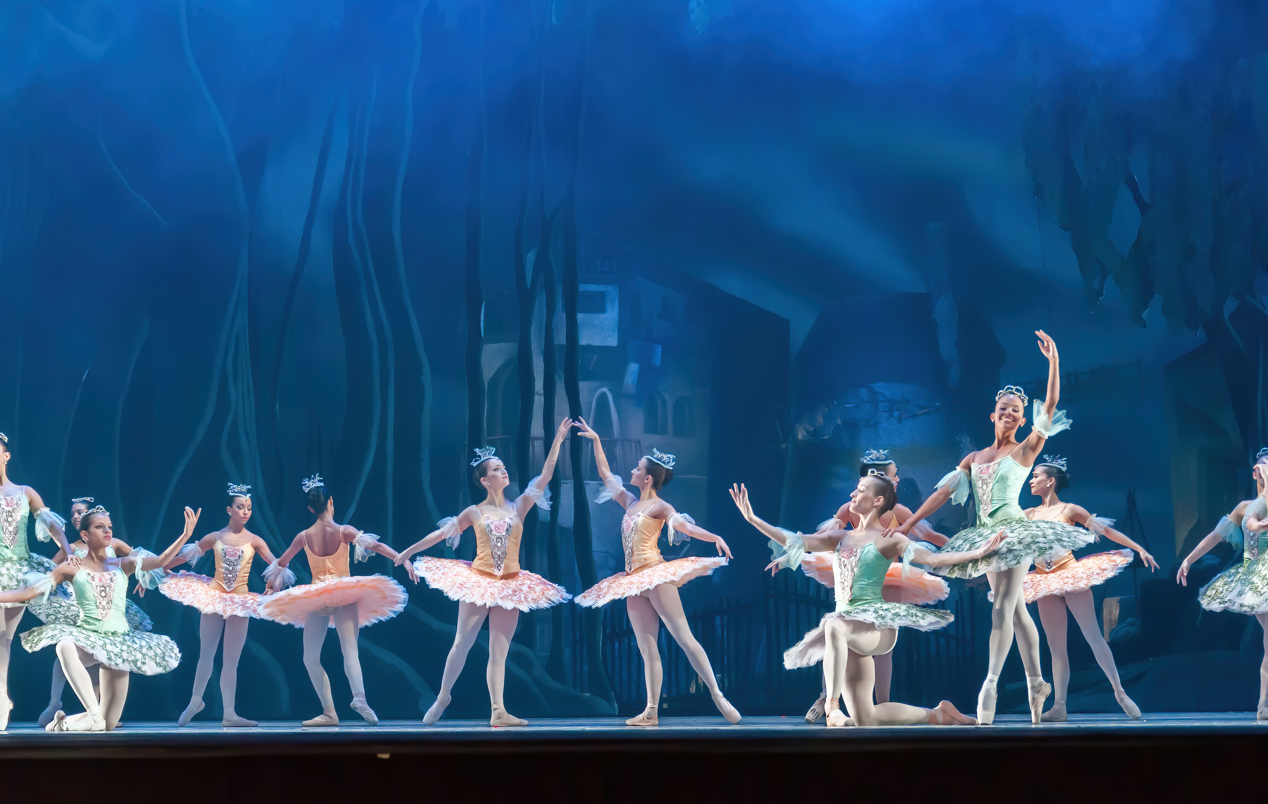 Don Quijote. Música: Ludwig Minkus. Coreografía: Laura Fiorucci basada en la original de Marius Petipa. Ballet Teresa Carreño. Teatro Teresa Carreño. Venezuela, 18 de octubre de 2013.